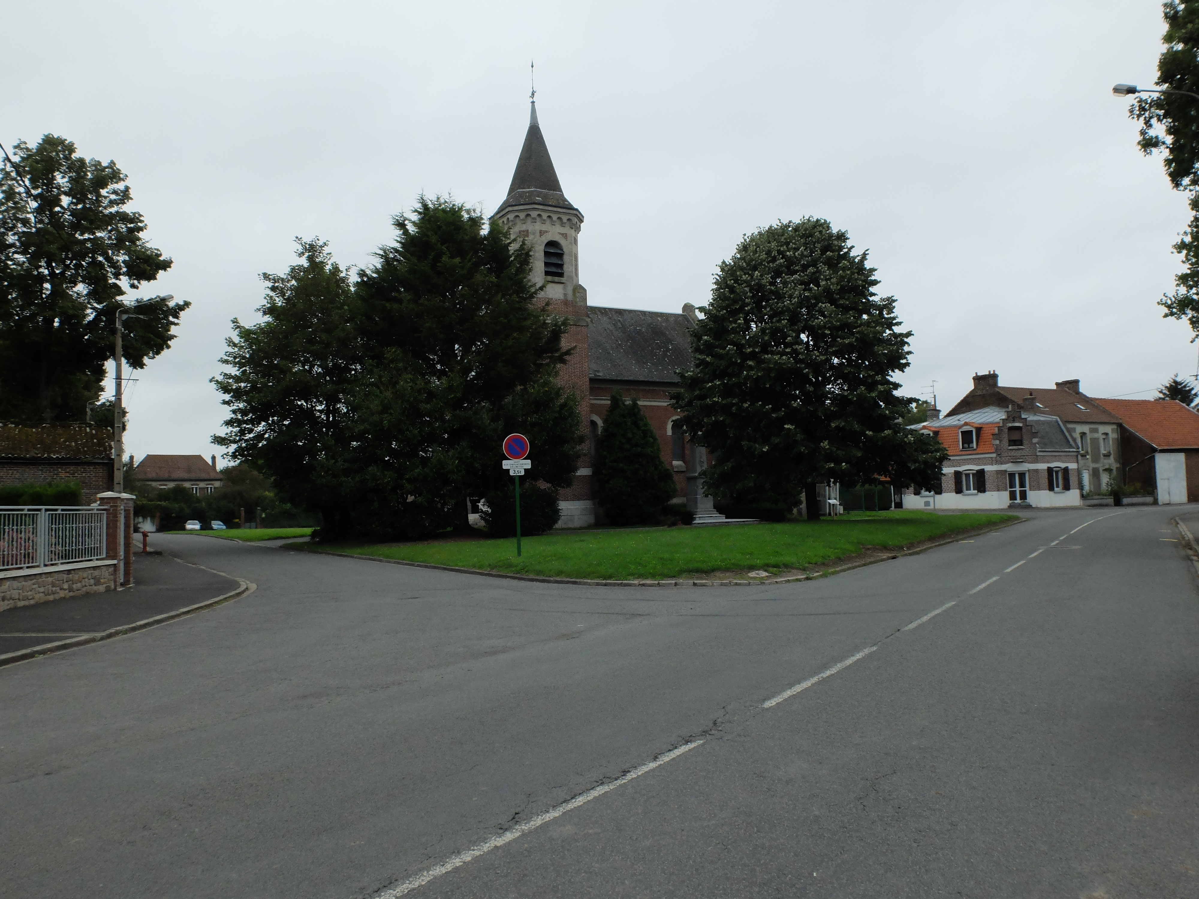 Vue de l'église Saint-Sèverin d'Écurie (Pas-de-Calais).